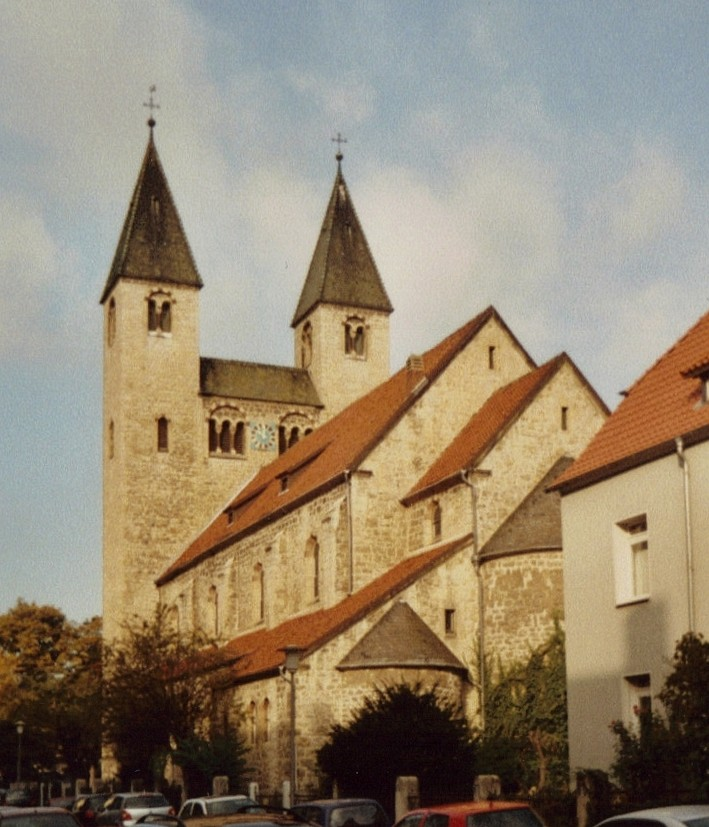 Hildesheim, kath. Kirche St. Elisabeth